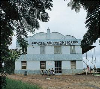 Hospital São Francisco de Assis